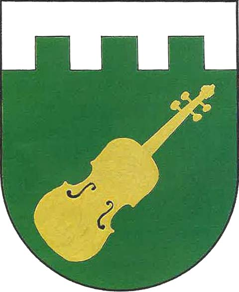 Blevice, znak. ZnakV zeleném štítě pod stříbrnou cimbuřovou hlavou šikmo zlaté housle.